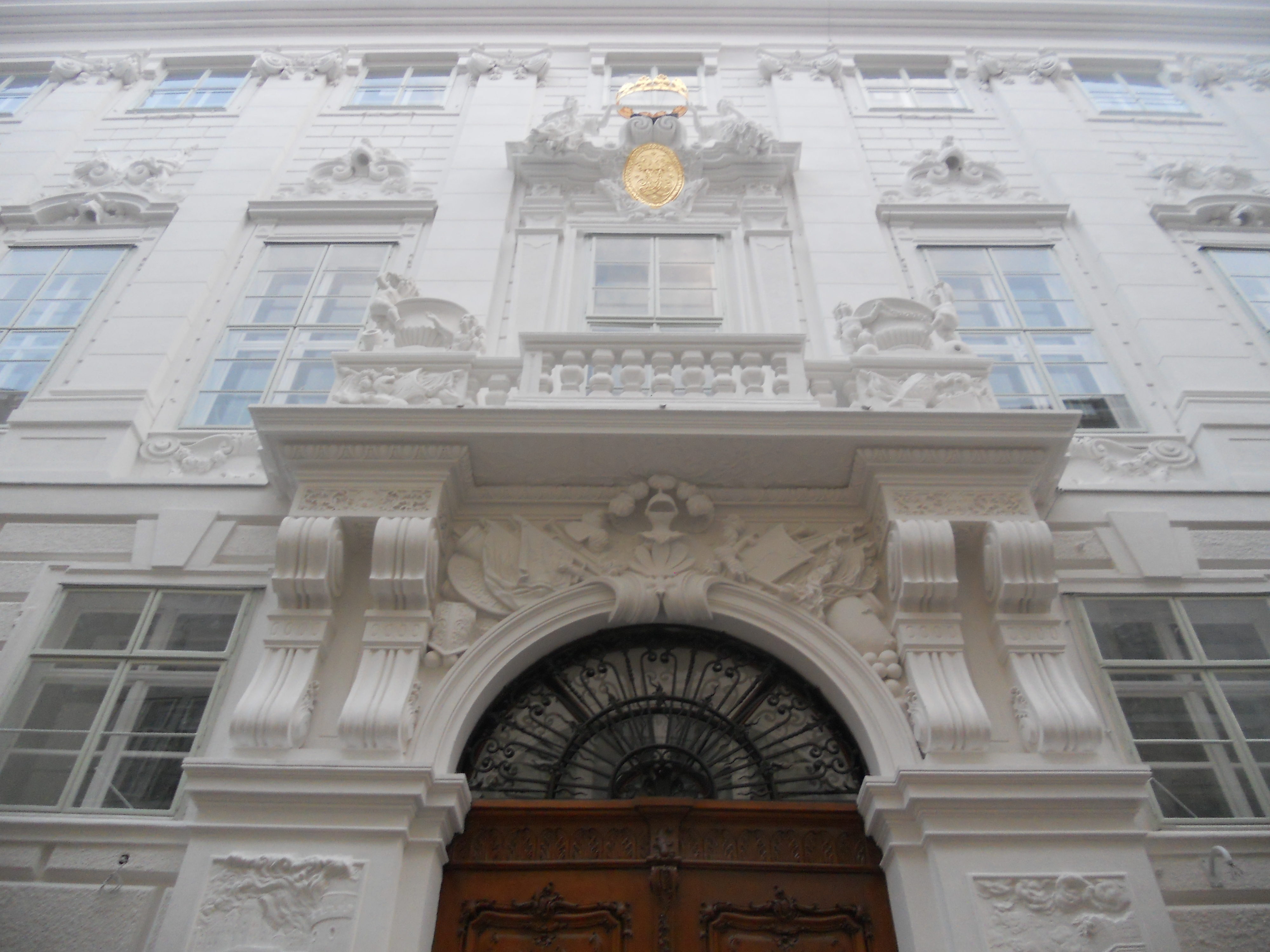 Ehem. Stadtpalais des Prinzen Eugen, BM für Finanzen im bereits renovierten Zustand September 2012, linkes Portal